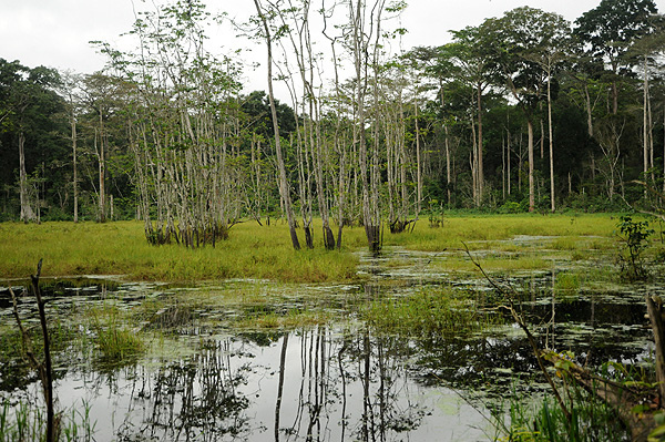 Lac ou saline marécageuse, numéro 7. Expédition Sangha2010, biodiversité en terre pygmée en République centrafricaine.